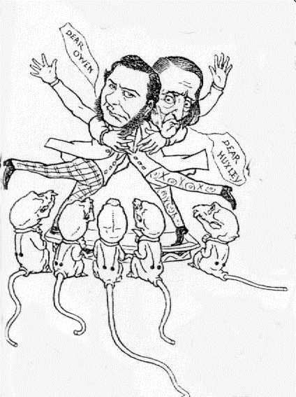 Karikatur The British Association - Detail mit Richard Owen und Thomas Henry Huxley